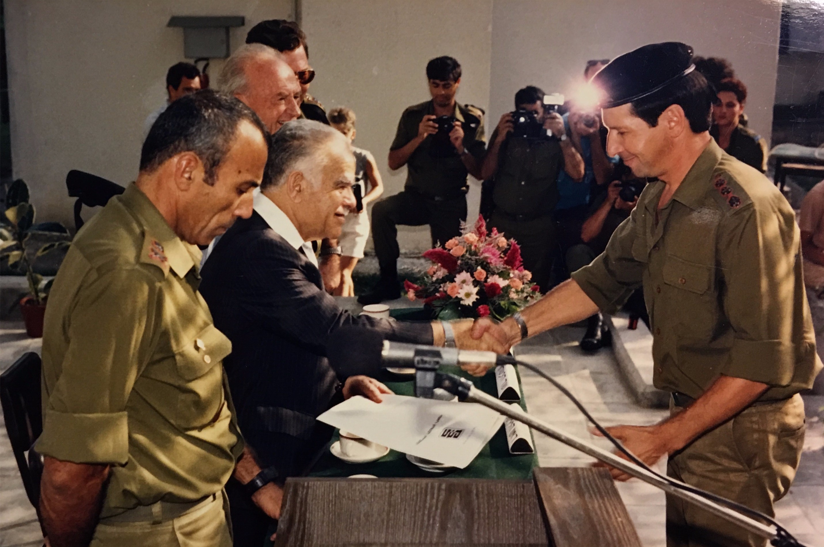 ראש הממשלה יצחק שמיר ז"ל ,שר הבטחון יצחר רבין ז"ל וחיים כץ בסיום המכללה לבטחון לאומי.